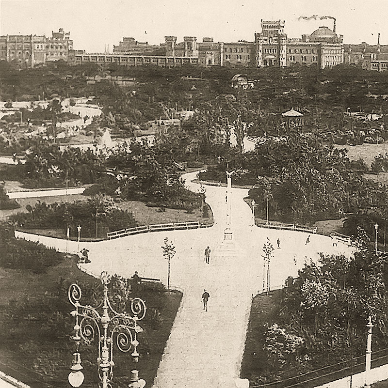 Maria Josefa Park (heute: Schweizergarten) in Wien, um 1900 im Hintergrund das Arsenal